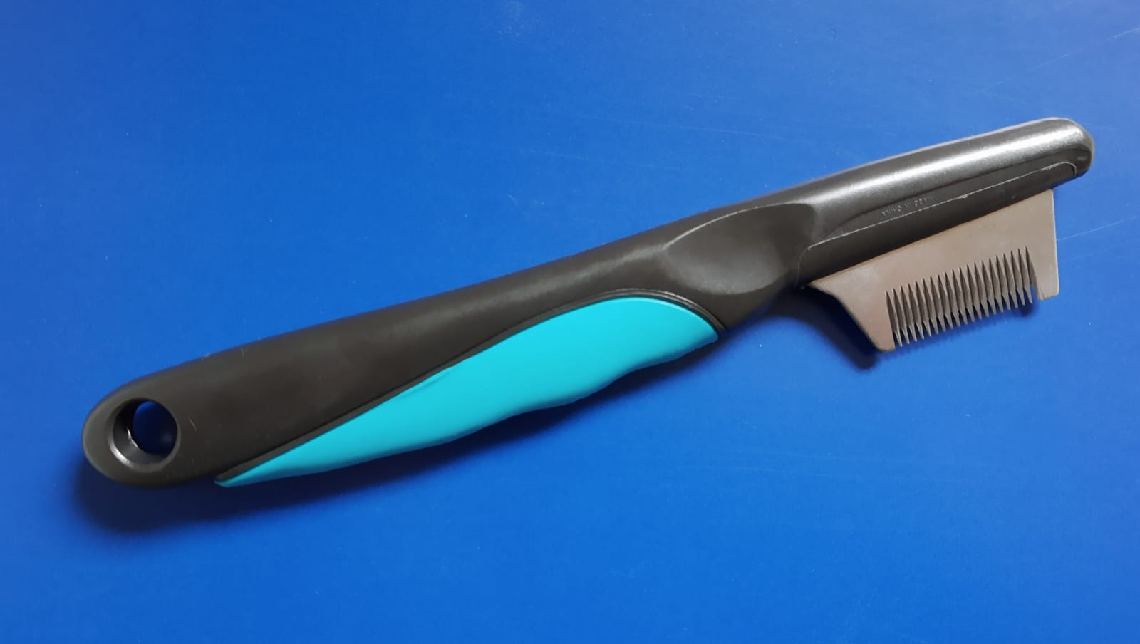 Ein Trimmmesser der Marke Trixie